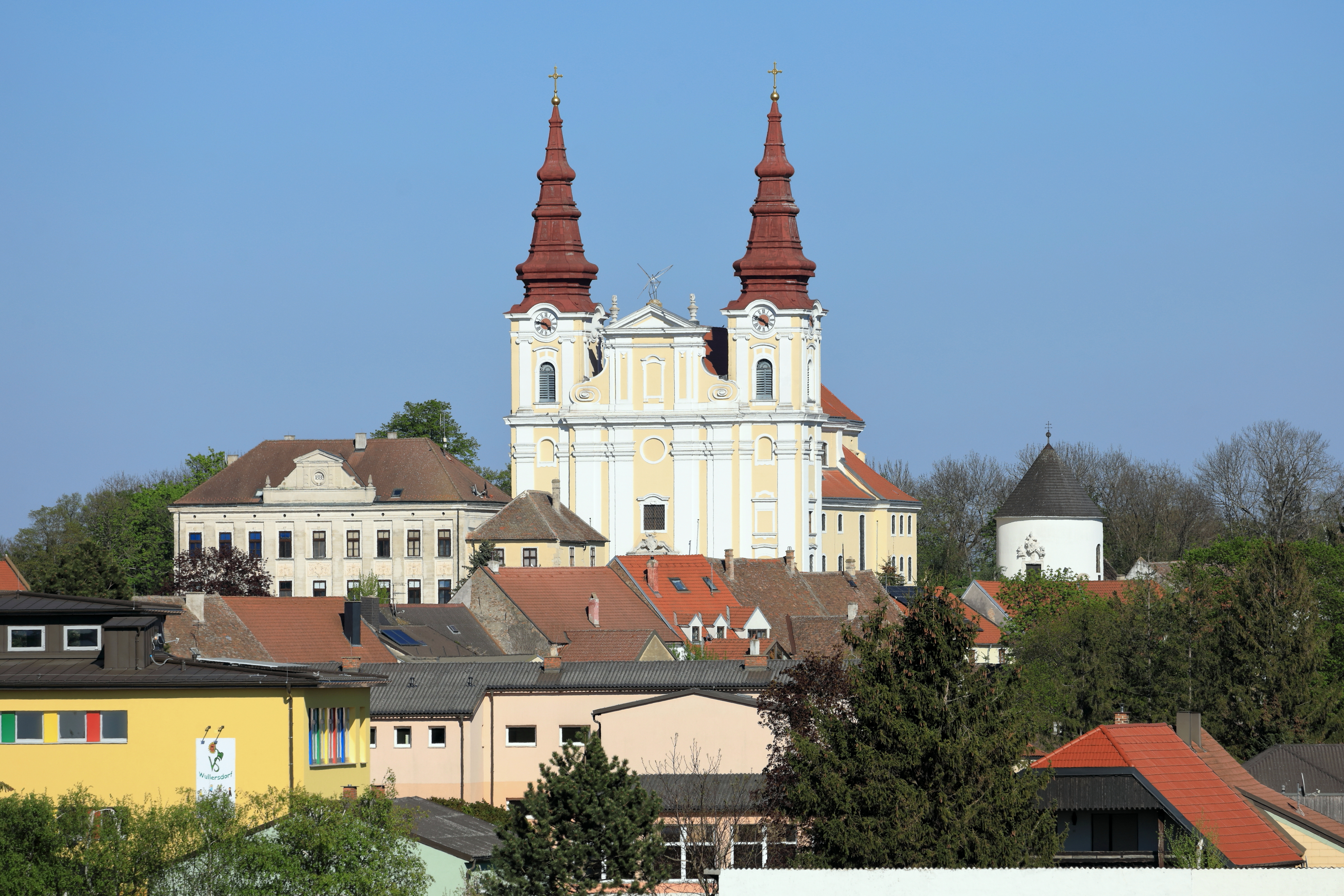 Westansicht des Zentrums der niederösterreichischen Marktgemeinde Wullersdorf. Im Bildzentrum die ortsbildbeherrschende Pfarrkirche hl. Georg. Links davor die ehemalige Schule, ein dreigeschoßiges Gebäude mit Walmdach sowie Giebelaufsatz und rechts der Rundkarner.